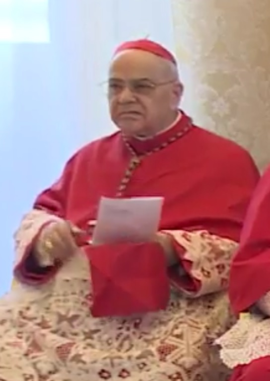 Le cardinal José Saraiva Martins au cours du consistoire ordinaire public du 20 avril 2017 du pape François.